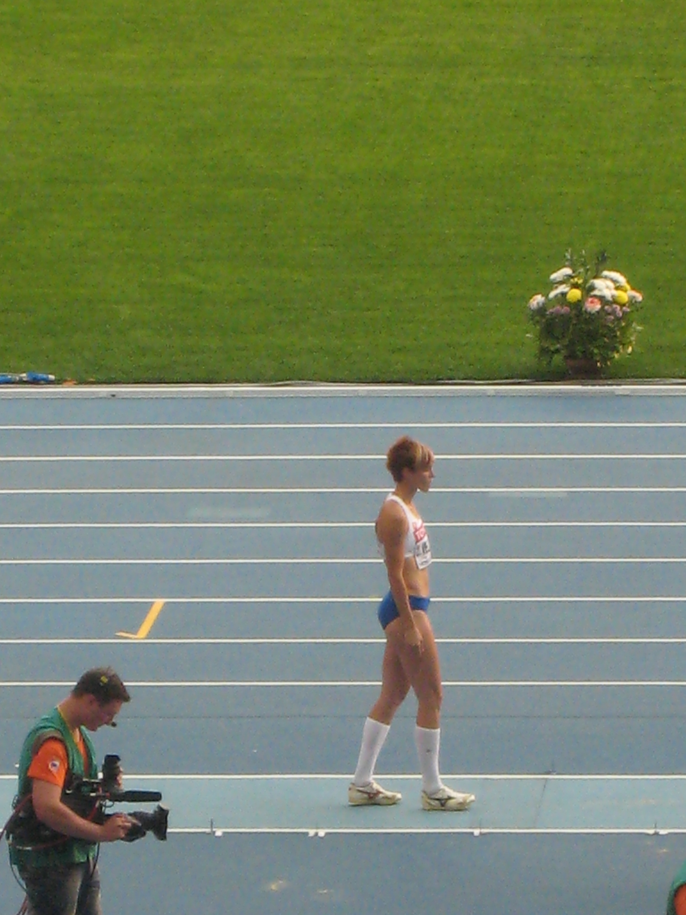 Чемпионат мира по лёгкой атлетике 2013. Словацкая спортсменка Дана Велдакова